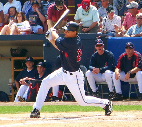 Grady Sizemore